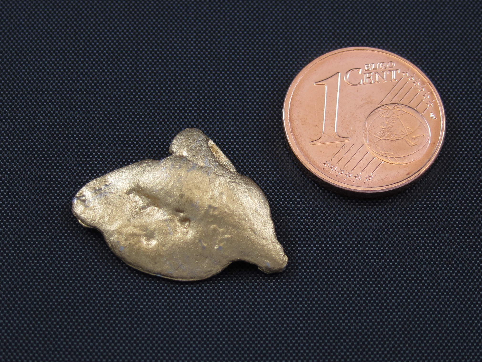 Ein Rentner aus Katzhütte fand 2004 im Bach "Katze" ein 9,64 g schweres Nugget aus echtem Gold.